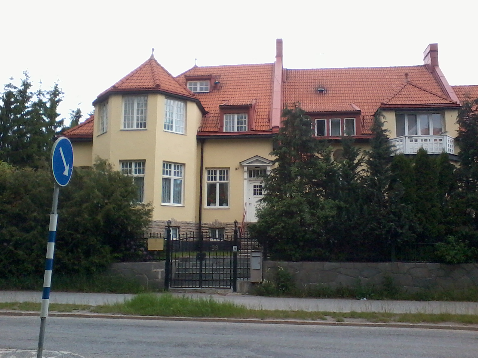 Nordkoreas ambassad på Lidingö